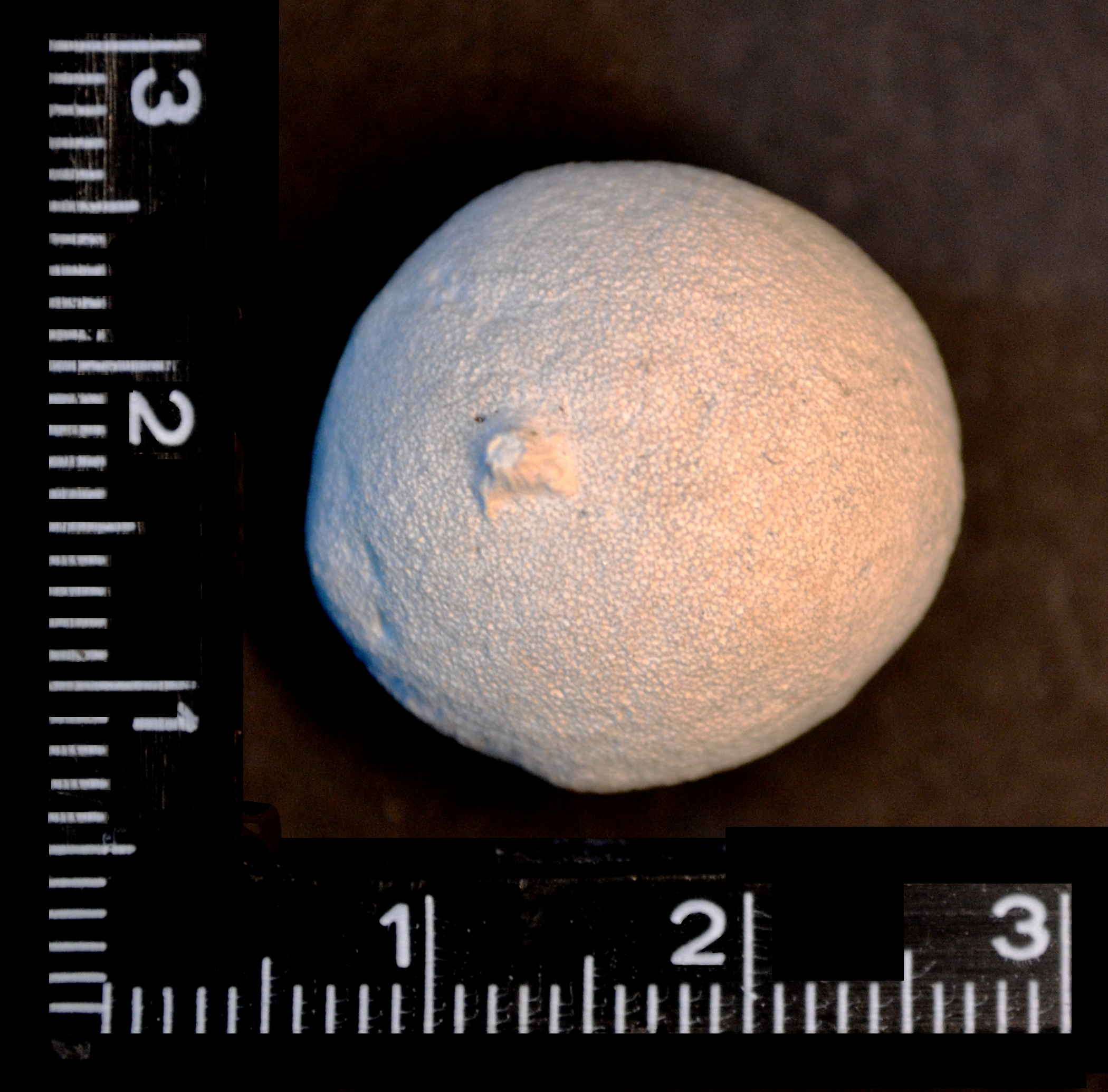 versteinertes Fossil eines kugeligen Kalkschwammes ("Porosphaera Globularis") mit Anhaftungsstelle aus Privatsammlung, Fundort: alter Teichaushub aus der "Rethener-Meiner Oberkreidemulde" in Rethen (Vordorf), Landkreis Gifhorn, Deutschland